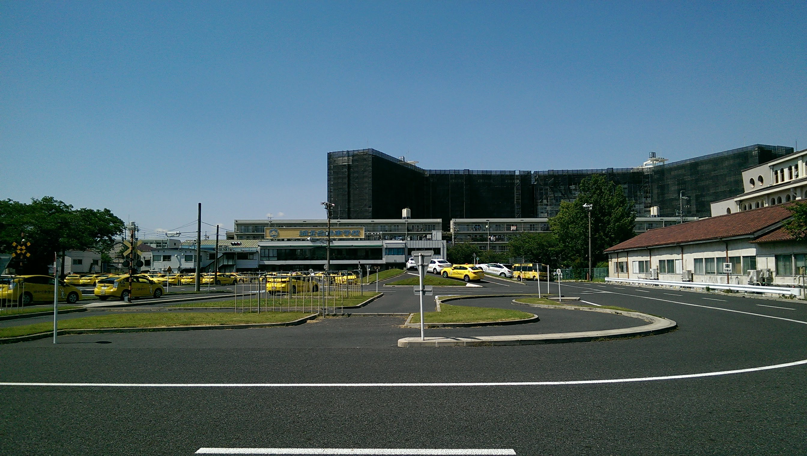 名古屋市北区金城一丁目の城北自動車学校